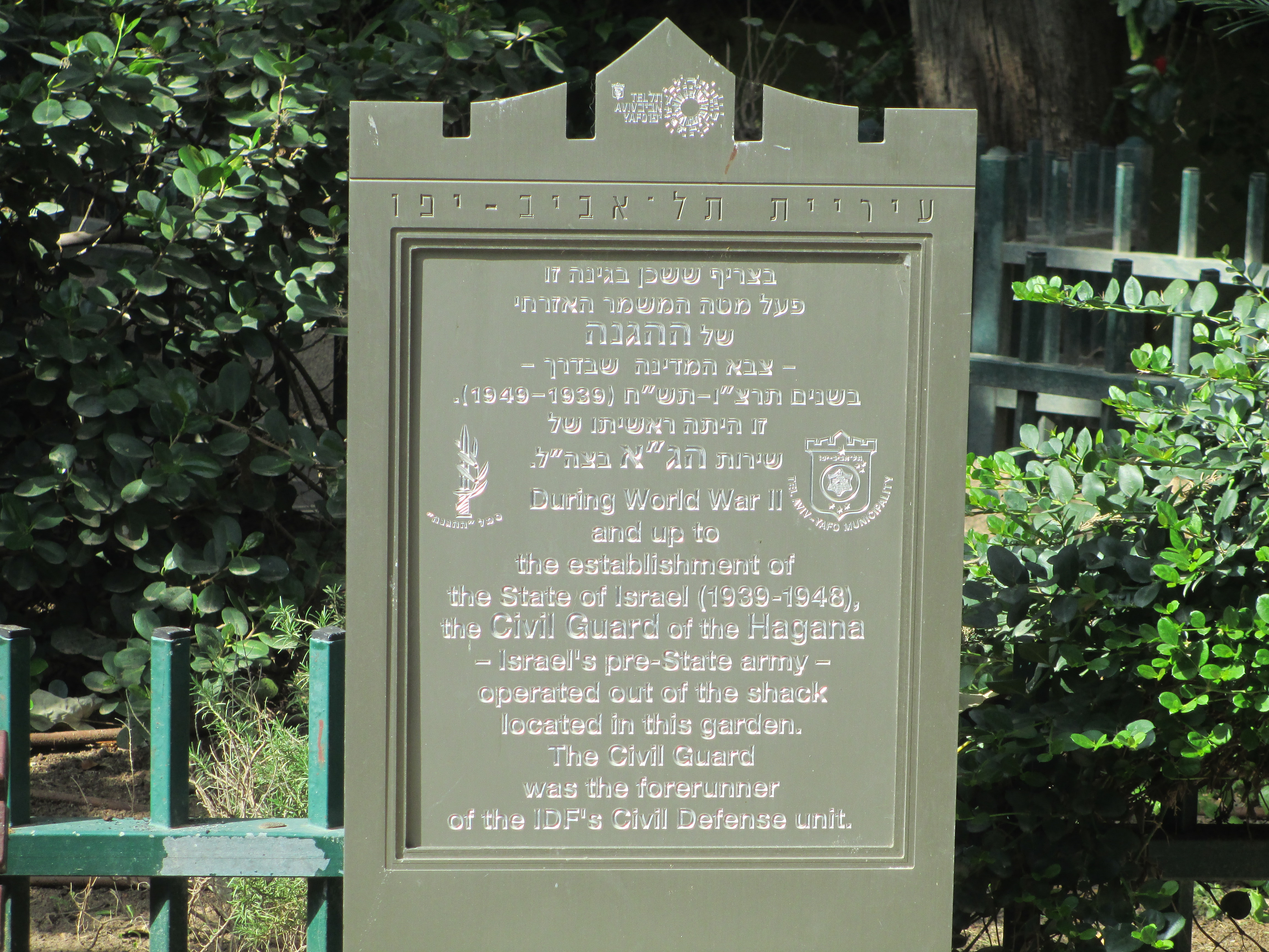 לוחית זיכרון במקום בו היה מטה המשמר האזרחי של ההגנה בתל אביב, רחוב גורדון 49